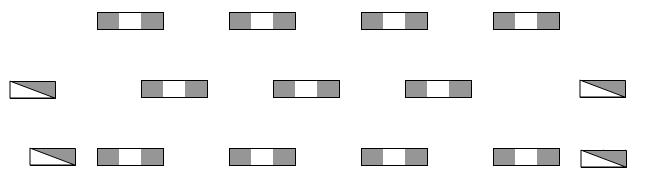 Schematische Darstellung der Niederländischen Ordonnanz, Aufstellung der Troups in drei Treffen, Kavallerie an den Flügeln